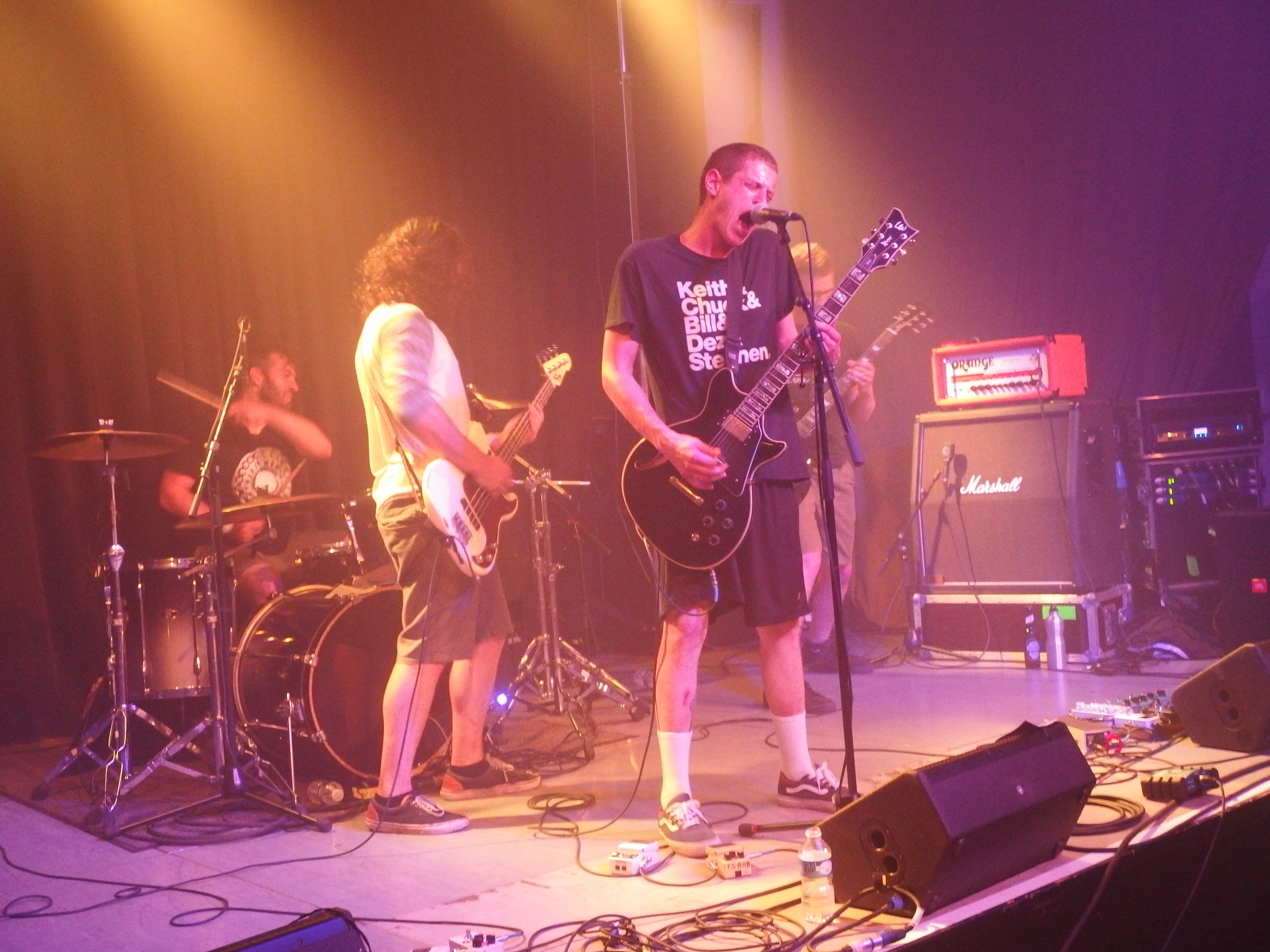 Such Gold live auf dem Rock Your Holidays Festival in Neunkirchen (Saar)